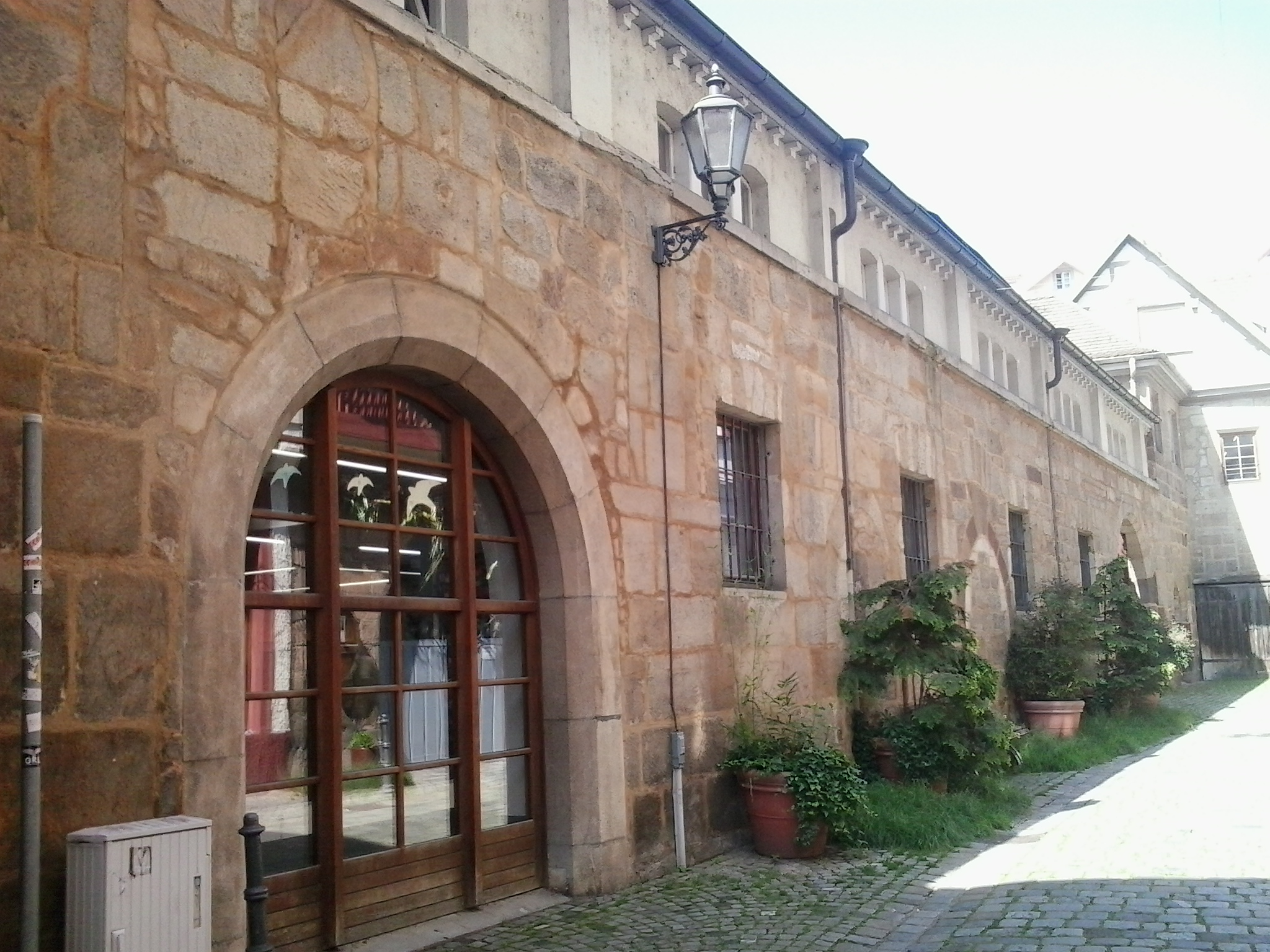 Der Kutscherbau, Teil des ehemaligen Bebenhäuser Pfleghofs in Esslingen. Liegt an der Webergasse 6.